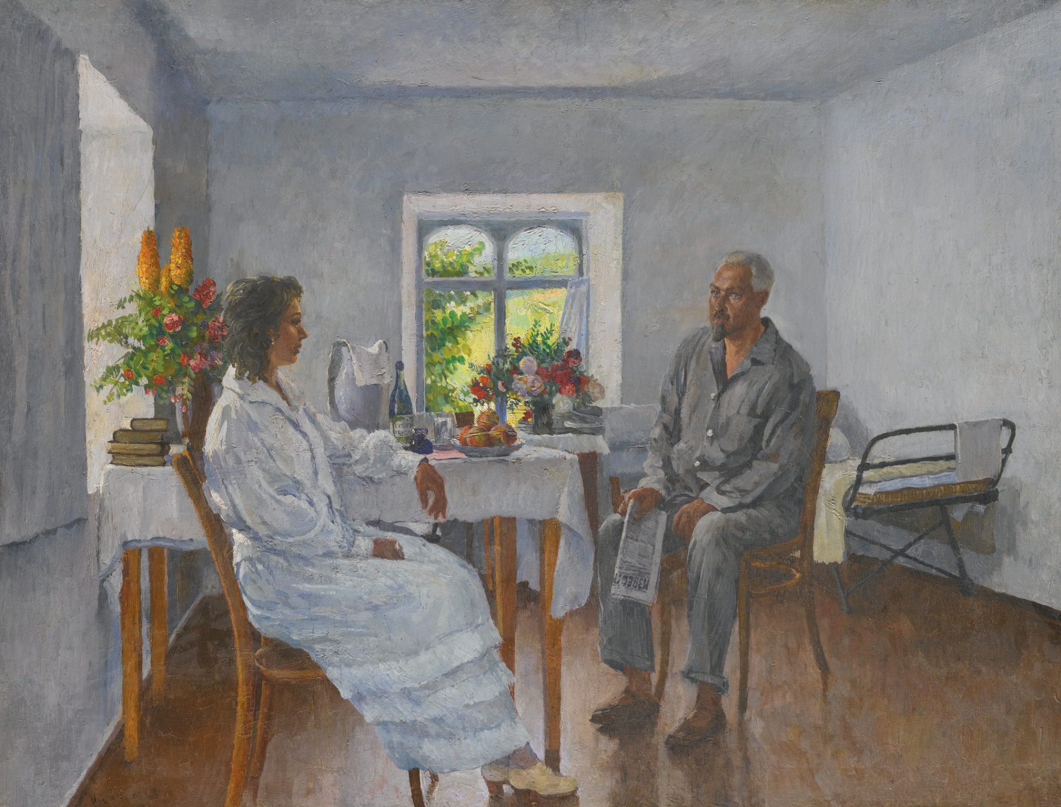 Машков И. И., Маргарита Ивановна и Зиновий Петрович Соловьев на отдыхе в Артеке. 1926г.